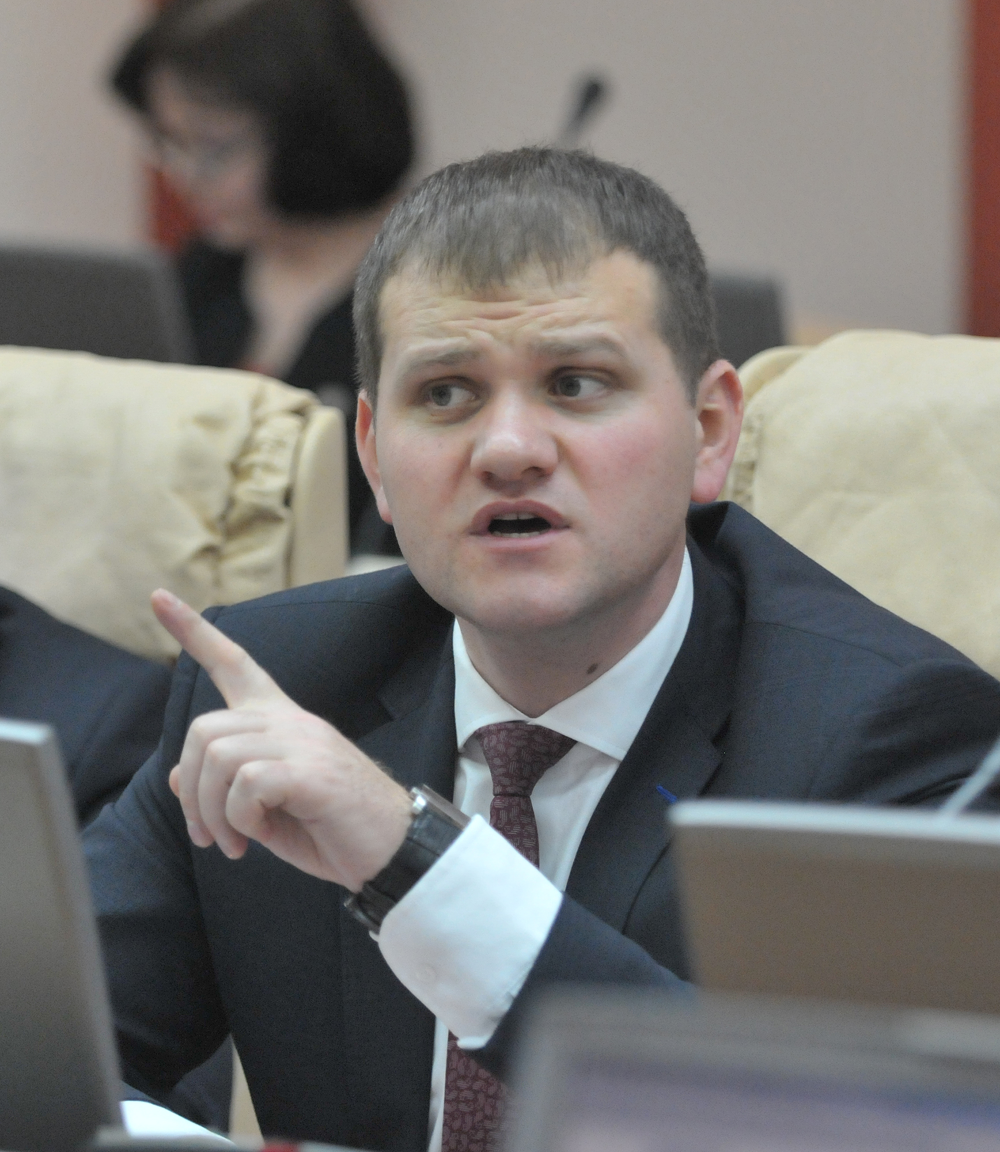 Valeriu Munteanu la ședința Guvernului